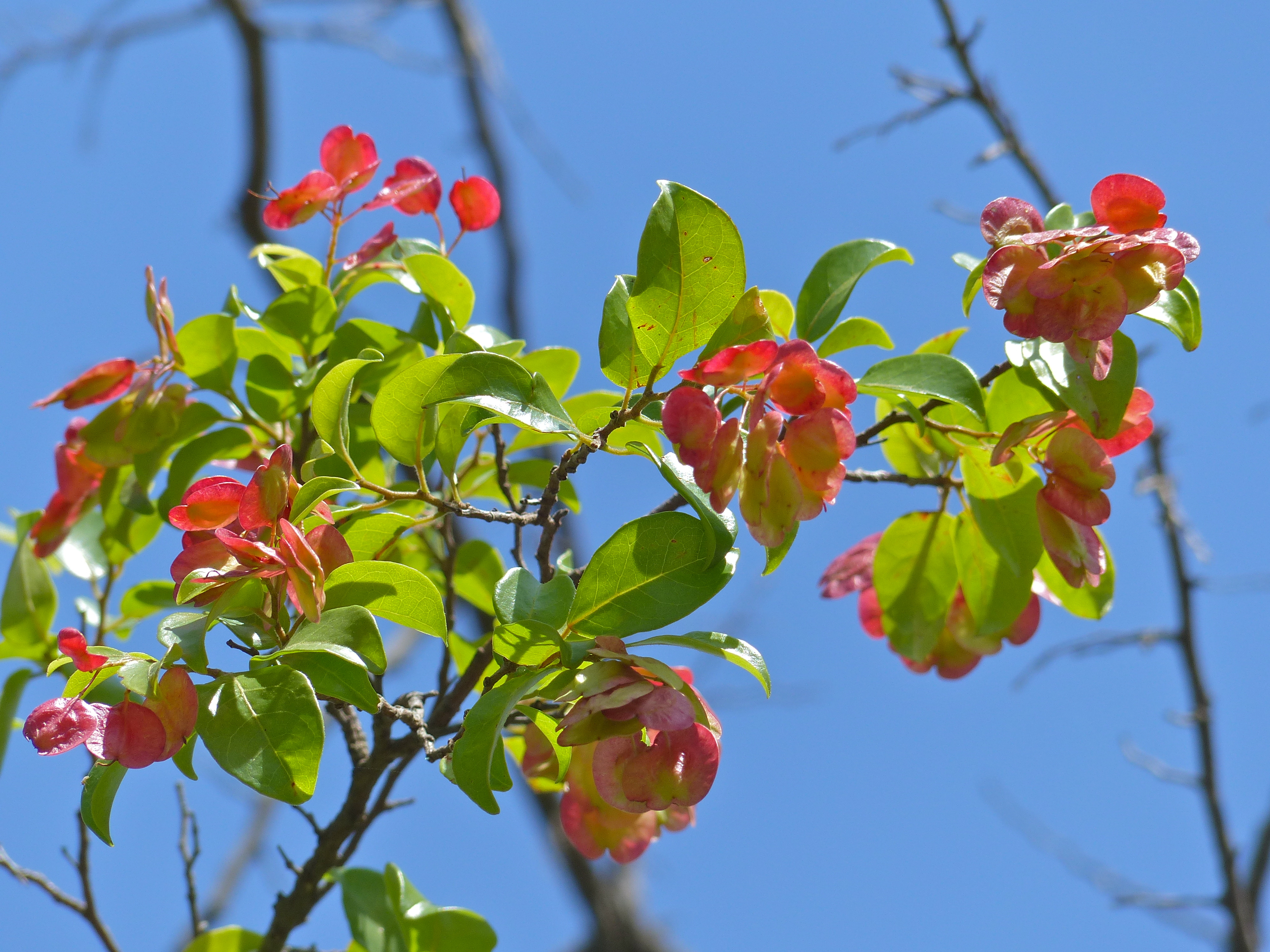 Mahonie Loop near Punda Maria, Kruger NP, SOUTH AFRICA